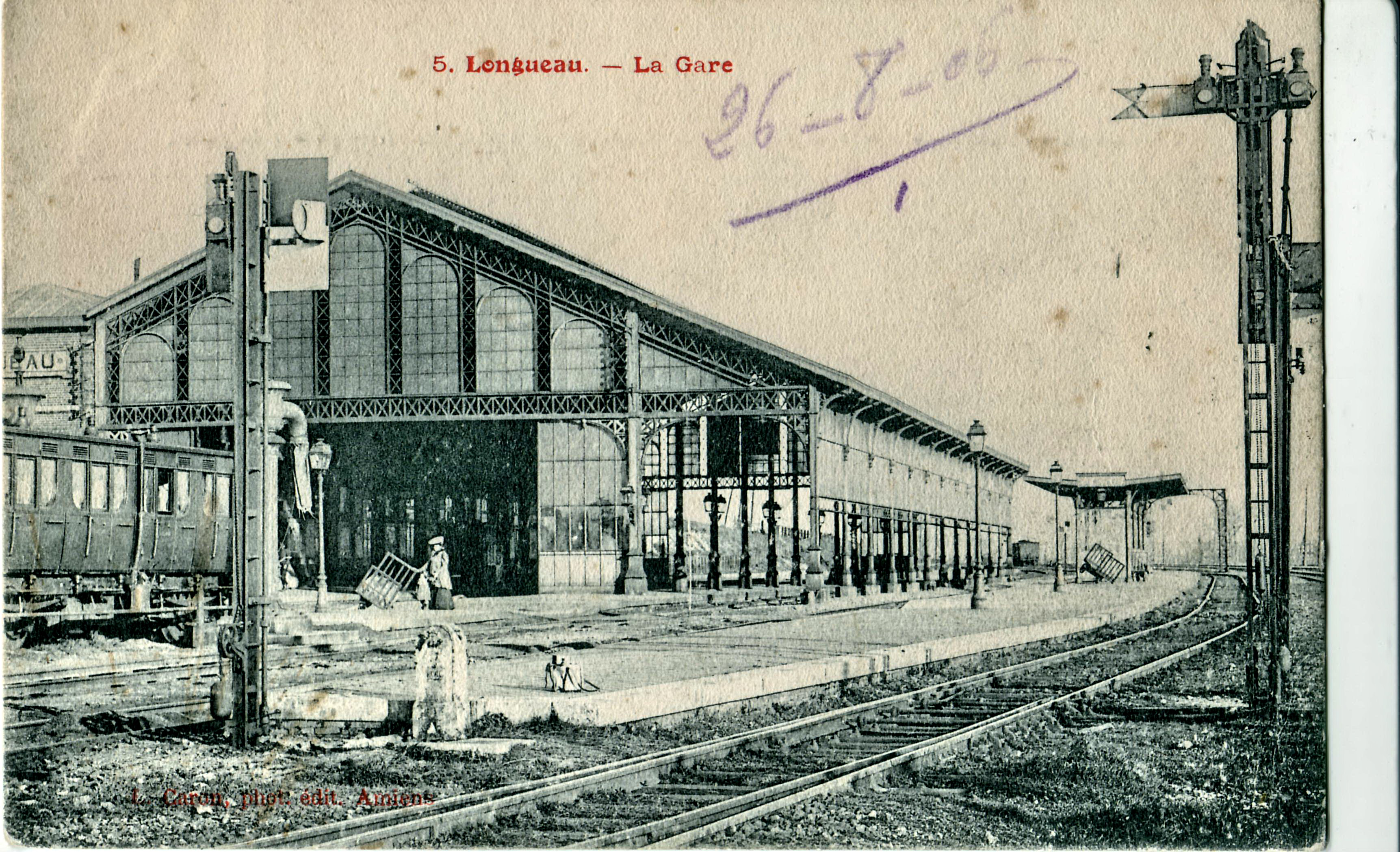 Carte postale ancienne éditée par Caron, N°5 LONGUEAU : La Gare